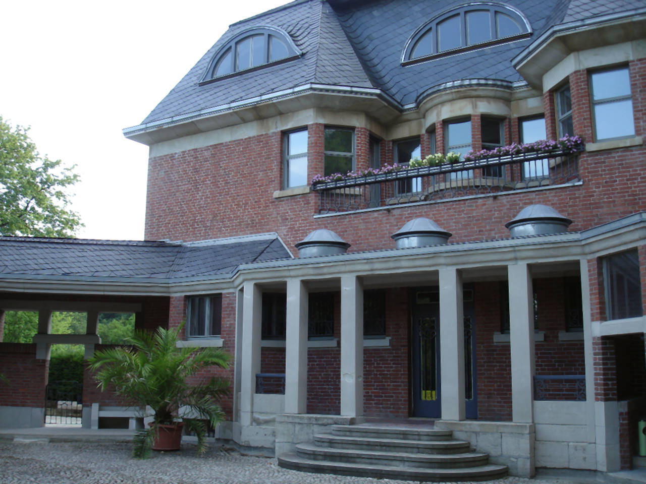 Schulenburgsche Villa in Gera. Architect: Henry van de Velde